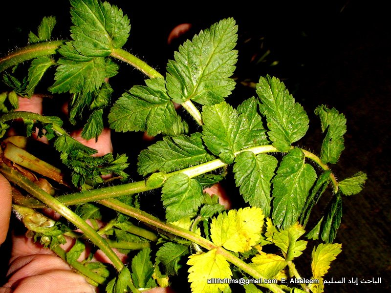 نباتات برّية سورية تؤكل